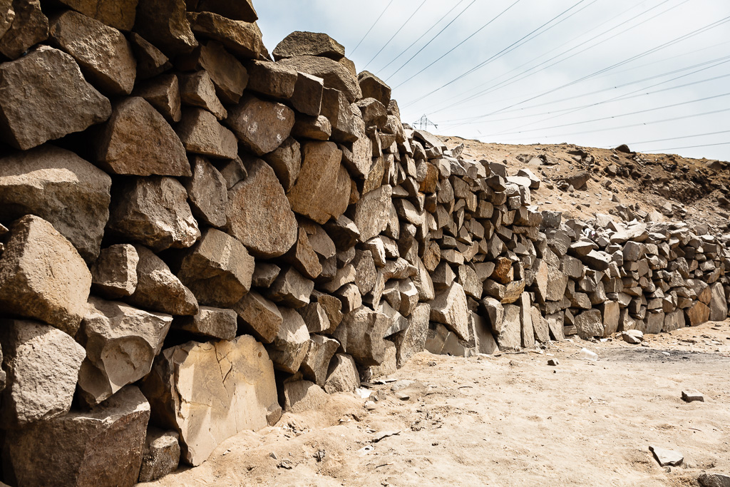 Detalle de muro de la plaza hundida.